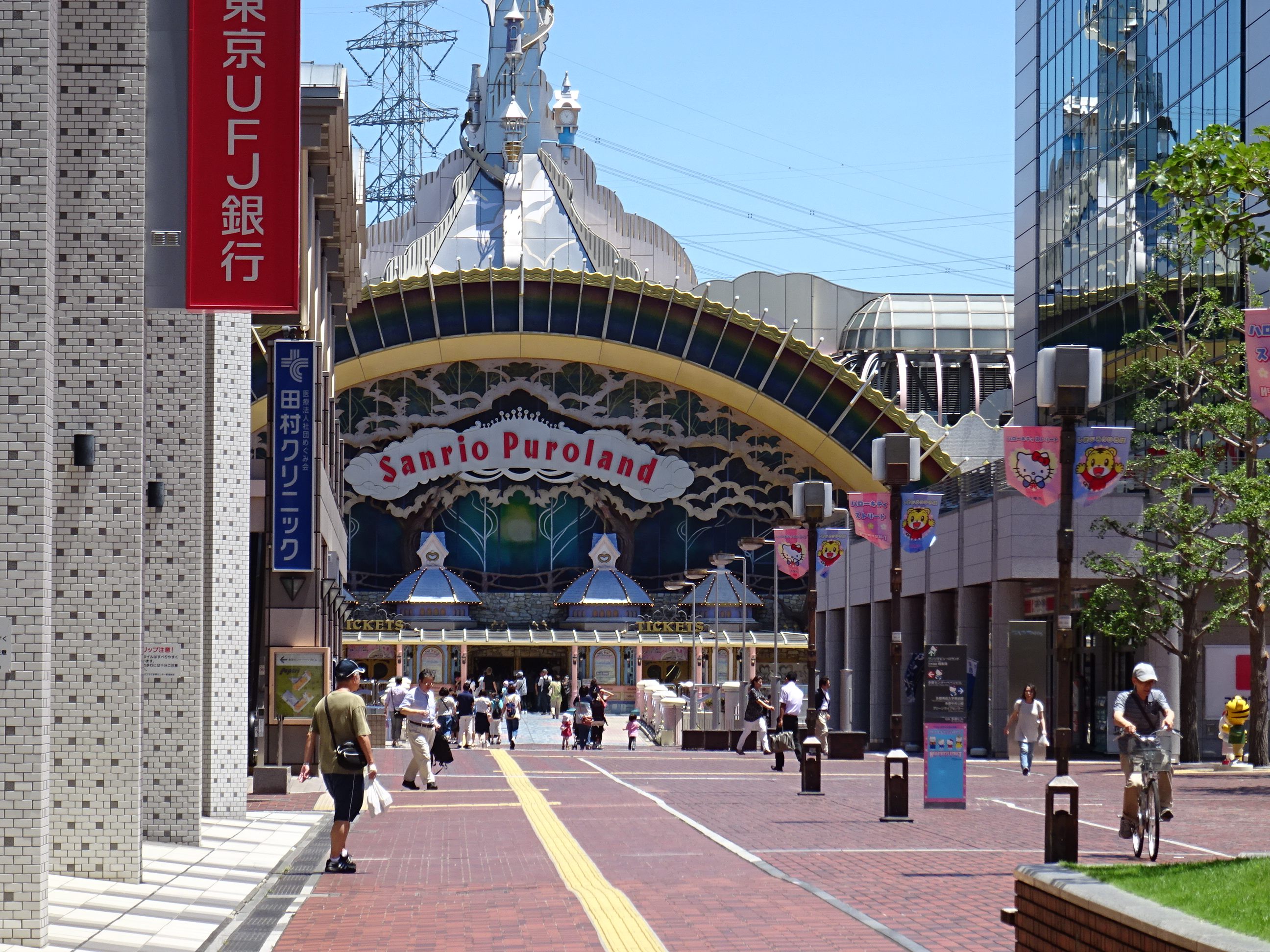 多摩センターのサンリオピューロランド（15/07/14撮影）